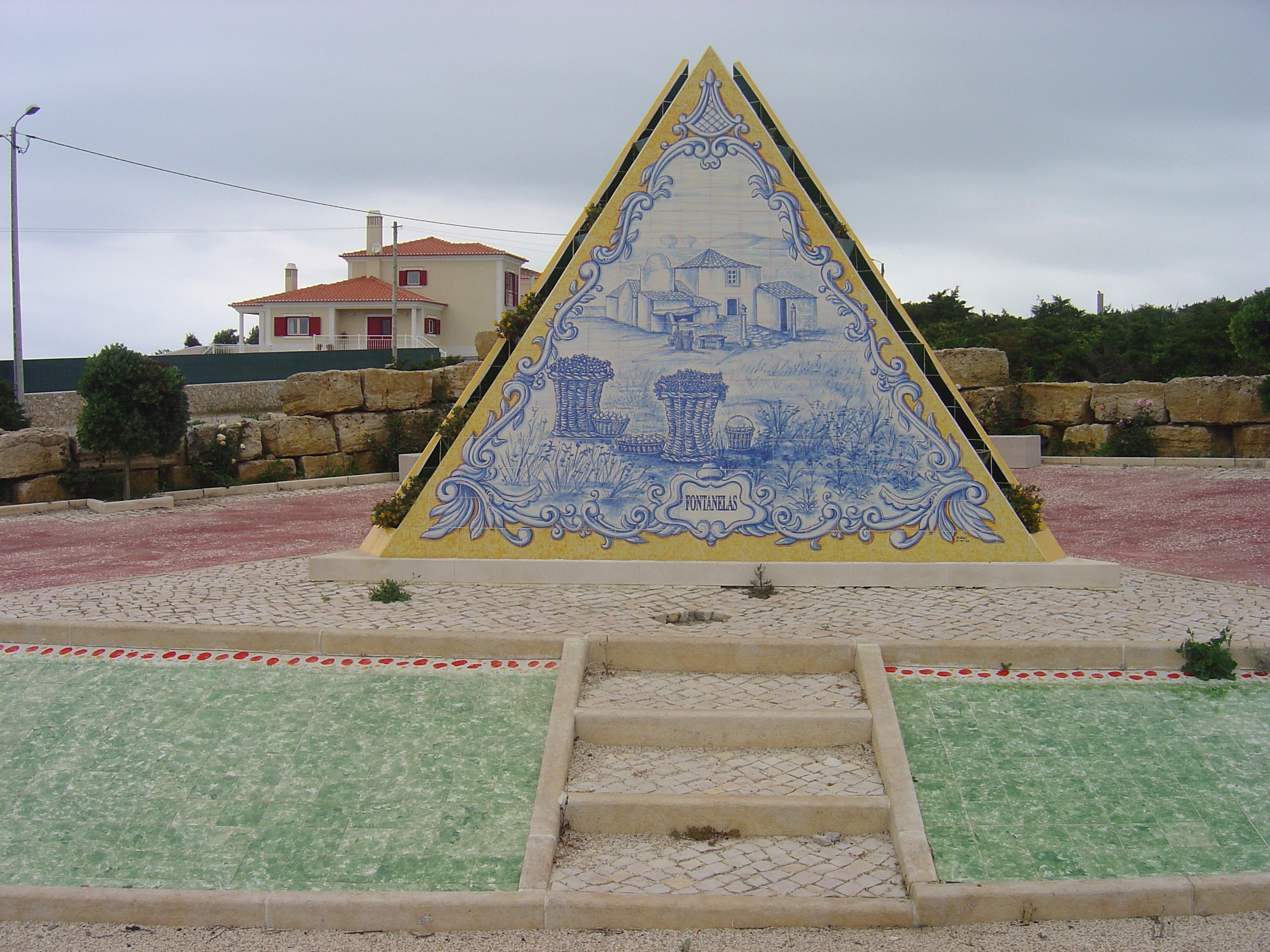 Fontanelas, Portugal